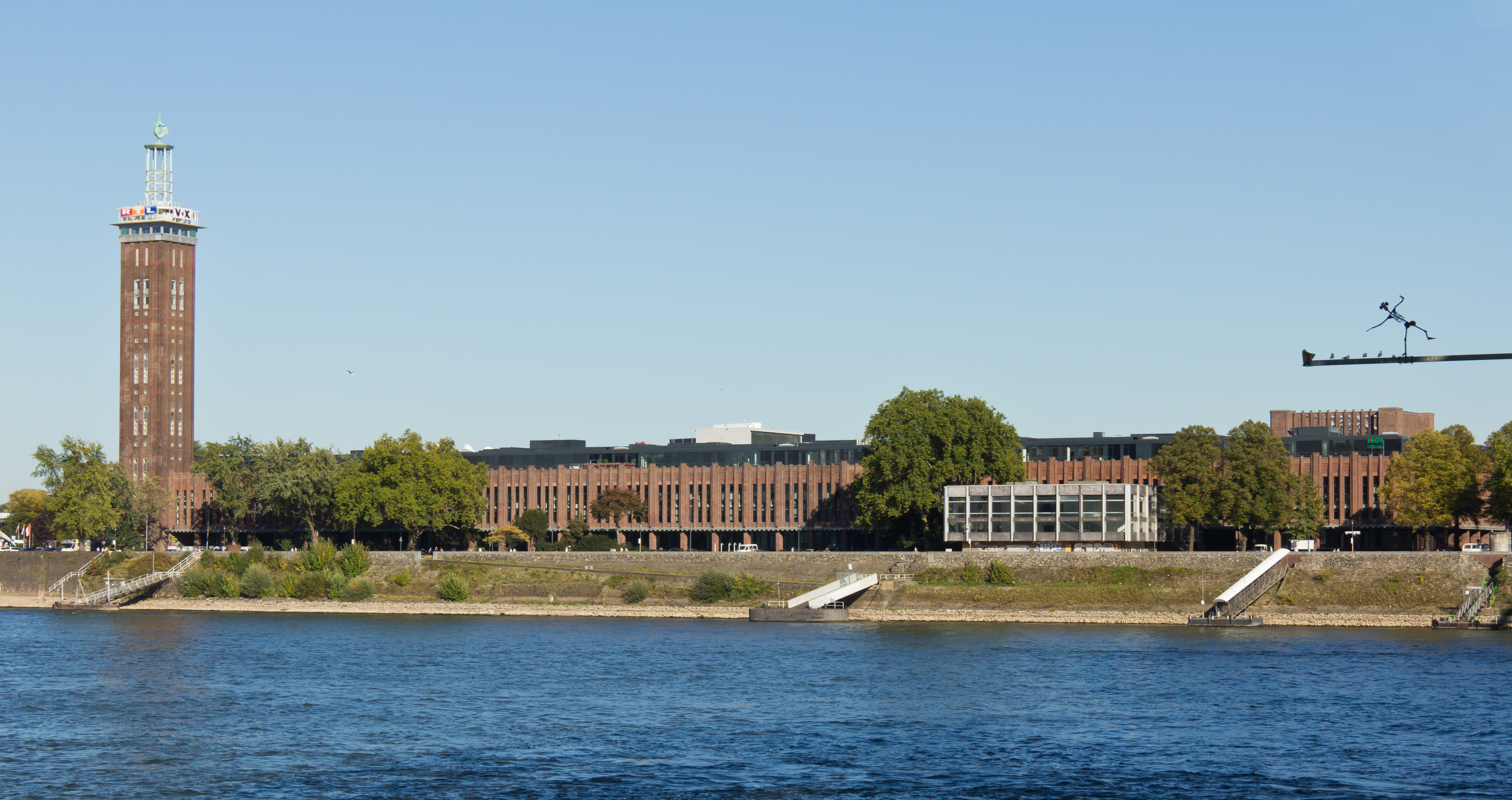 Denkmalgeschützter Messeturm und die Rheinhallen. Die schwebende Figur an der rechten Seite befindet sich an der Hohenzollernbrücke. This is a photograph of an architectural monument.